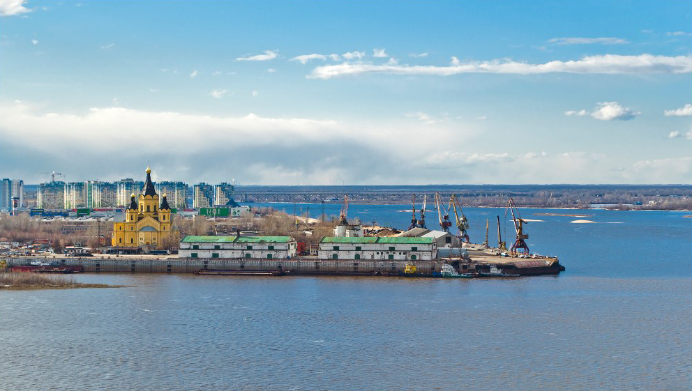 Стрелка Оки и Волги